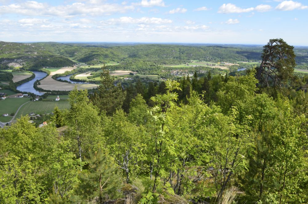 Fra toppen av Jordstøyp er det flott utsikt over Lågendalen.